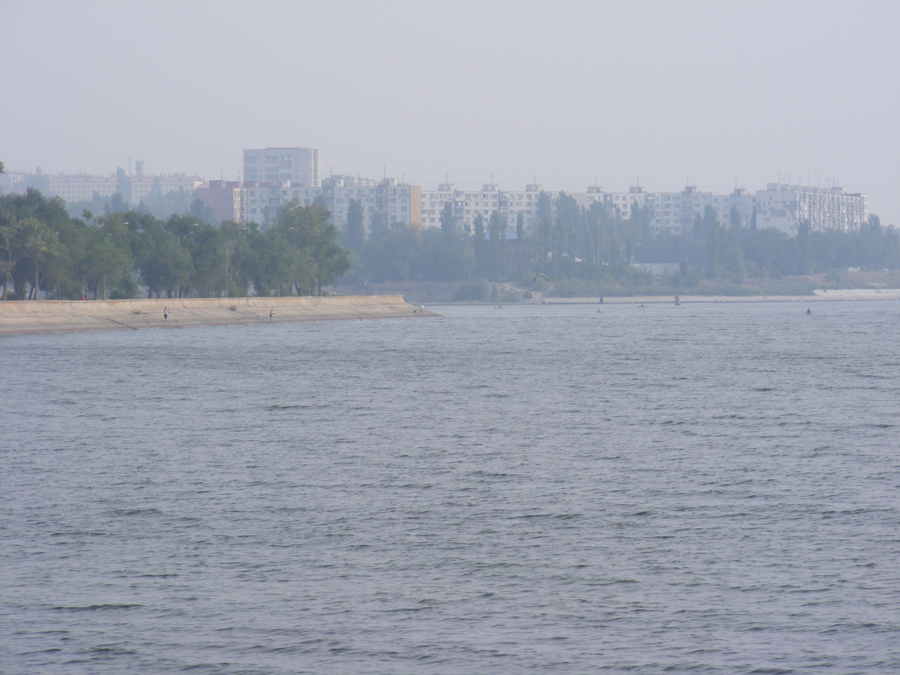 Вид на город Камышин в месте, где река Камышинка впадает в Волгоградское водохранилище.